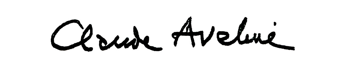 Signature de l'écrivain Claude Aveline, scan d'après lettre à l'User. This signature is believed to be ineligible for copyright and therefore in the public domain because it falls below the required level of originality for copyright protection both in the United States and in the source country (if different). In this case, the source country (e.g. the country of nationality of the signatory) is believed to be France. Cette image ou le texte qui y est représenté est seulement composé de formes géométriques simples et de texte. Elle n’atteint pas le seuil d'originalité nécessaire pour la protection du droit d’auteur, et est donc du domaine public.